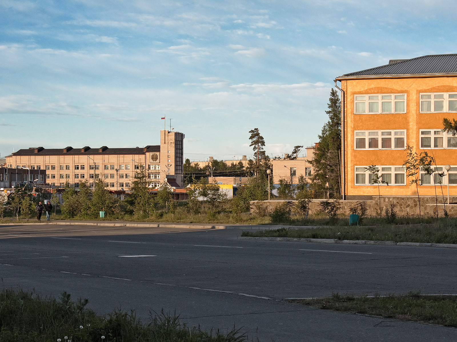 Вид на центр города